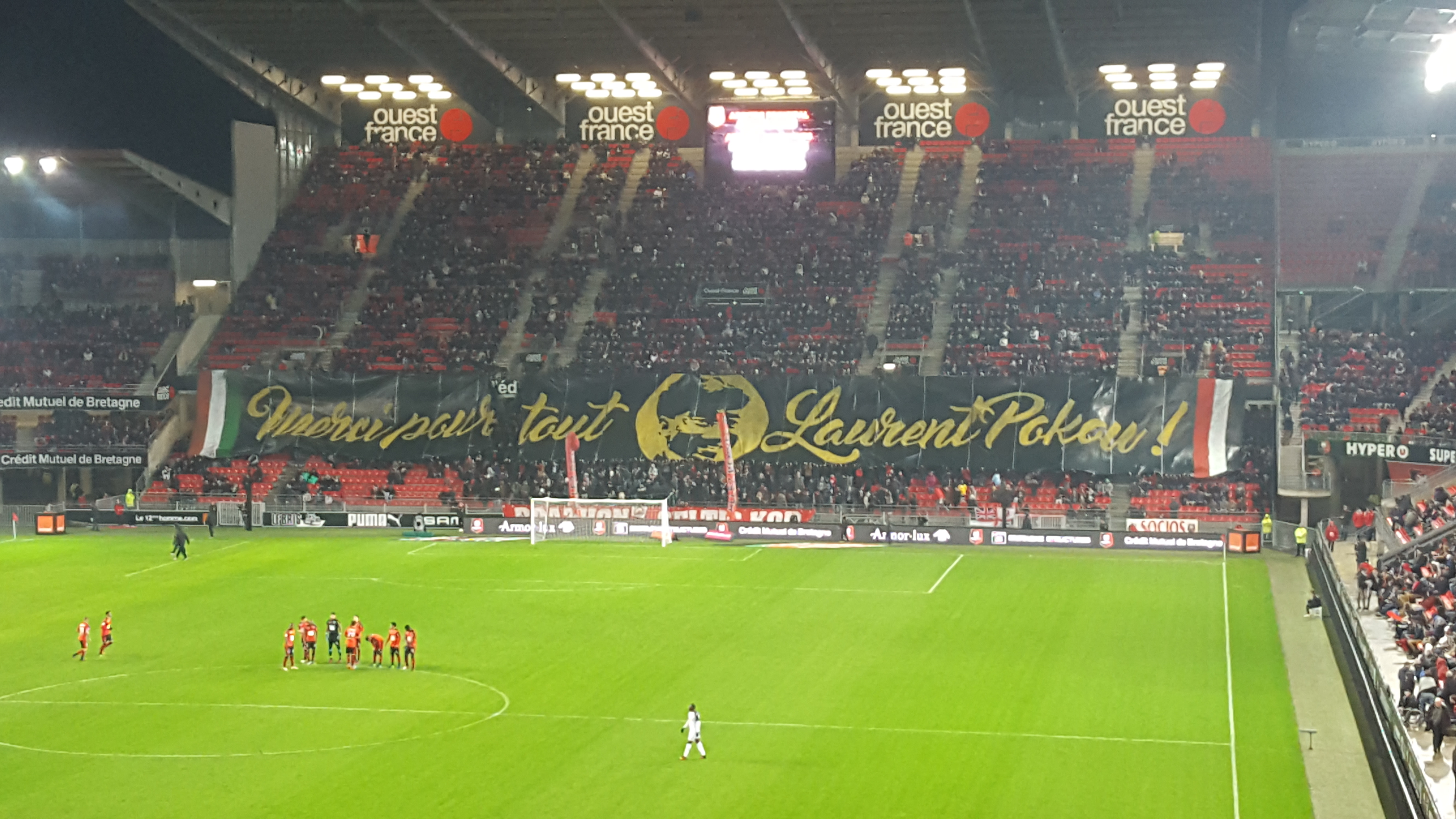 Hommage rendu par le public du Roazhon Park à Laurent Pokou, après la mort de ce dernier six jours auparavant, avant une rencontre entre le Stade rennais et le SCO Angers le 19 novembre 2016.